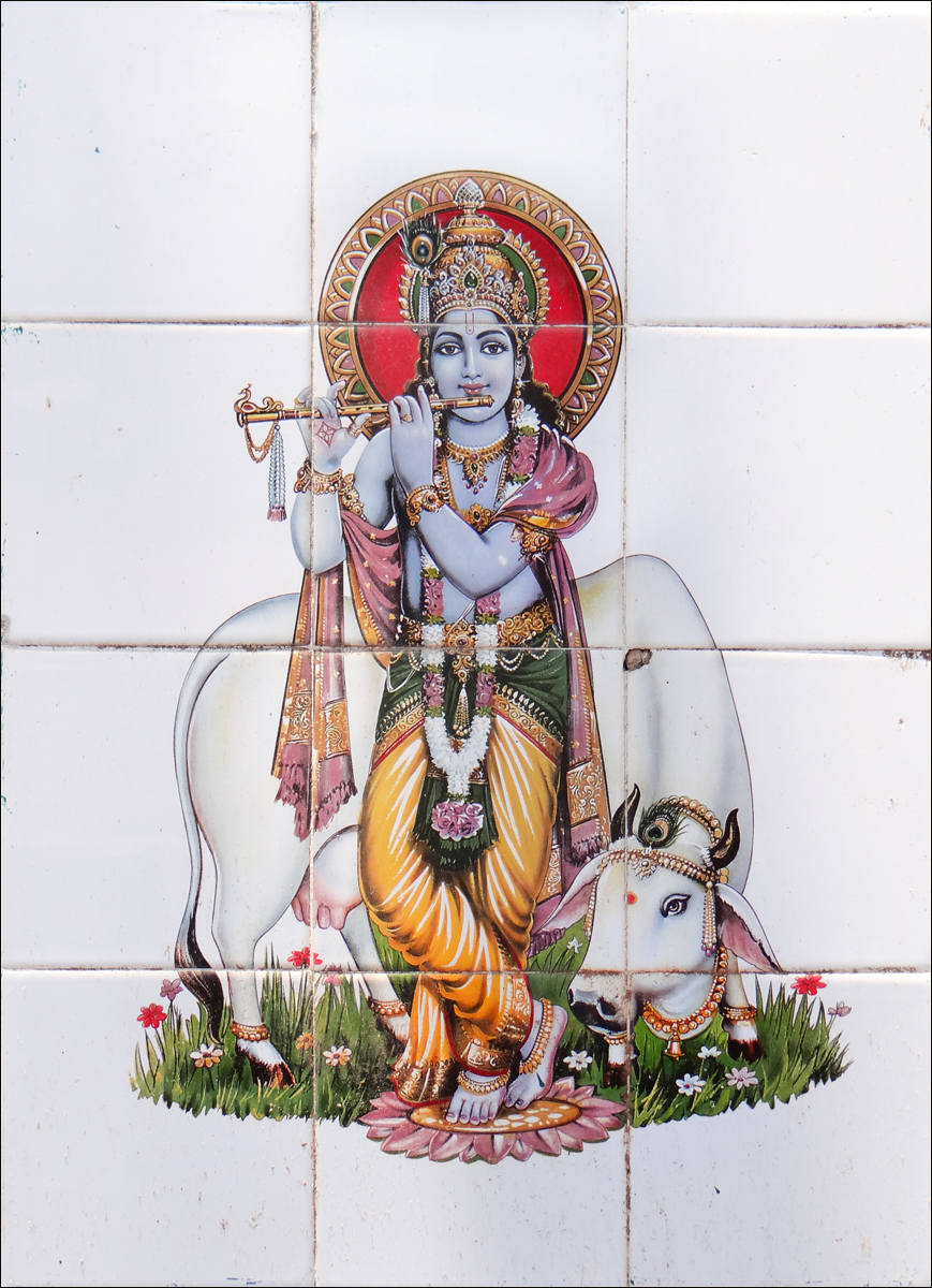 Représentation de Krishna sur le mur d'enceinte du temple recouvert de carreaux de céramique